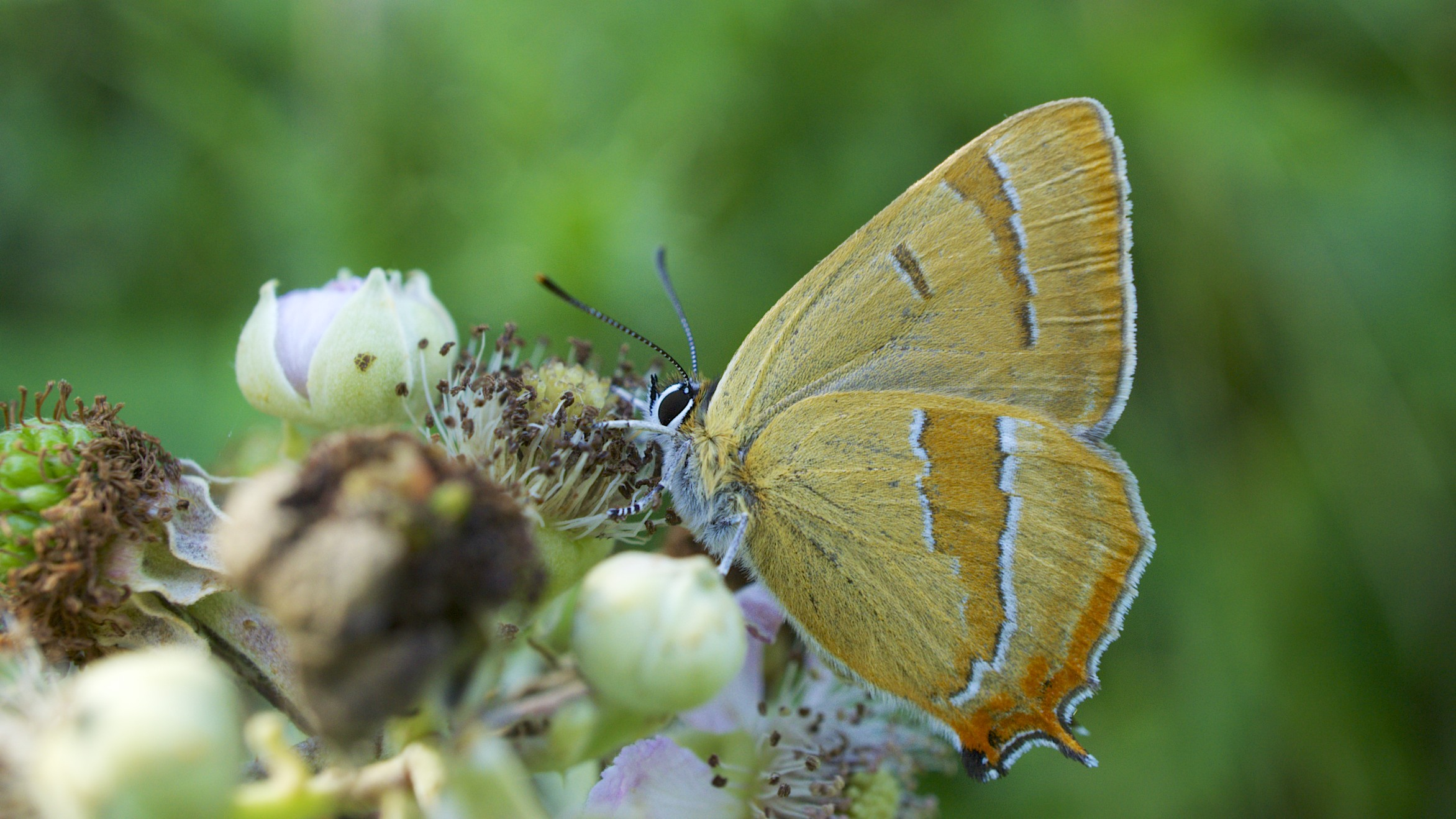 Alners Gorse, Dorset.